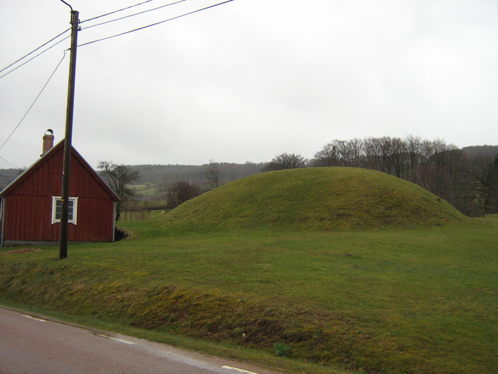 Lugnarohögen (RAÄ-nummer Hasslöv 3:1), Laholms kommun, Halland, Sverige.